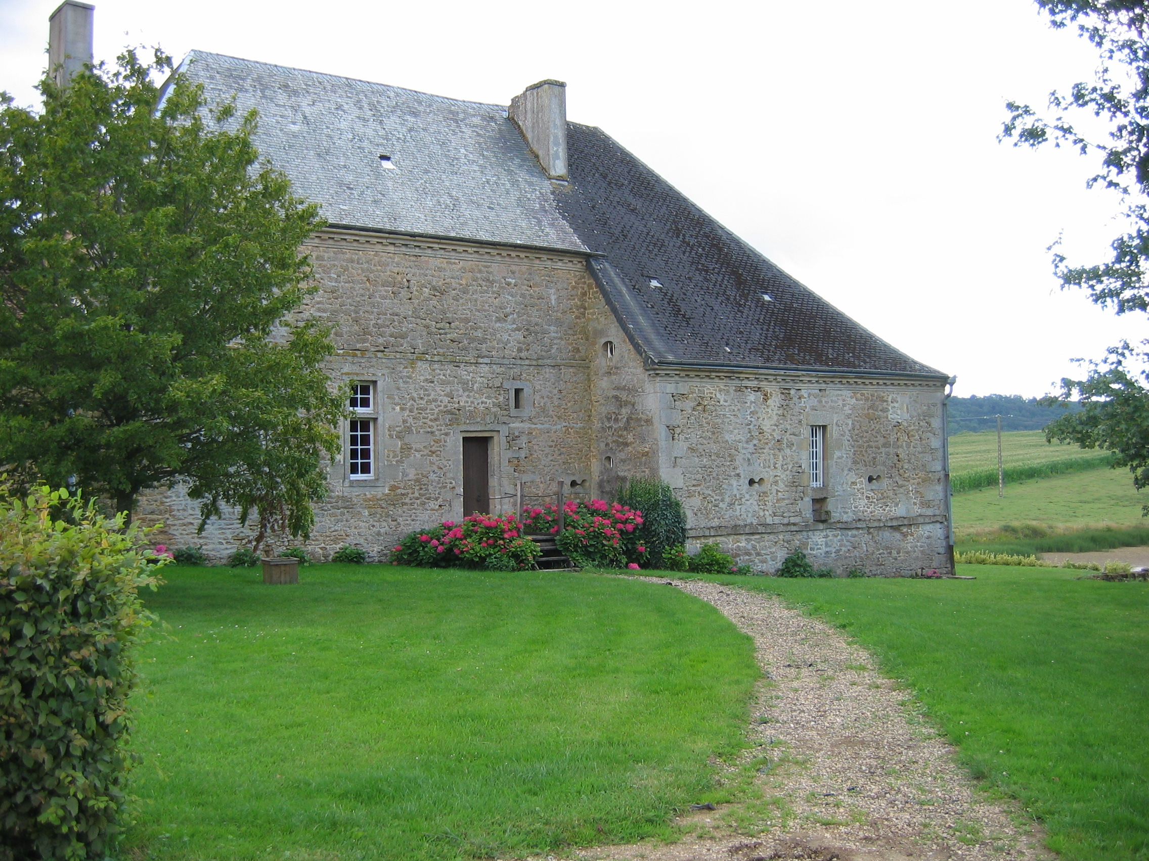 La Raminoise Vue 3 (nord - Maisoncelle et Villers - Ardennes France